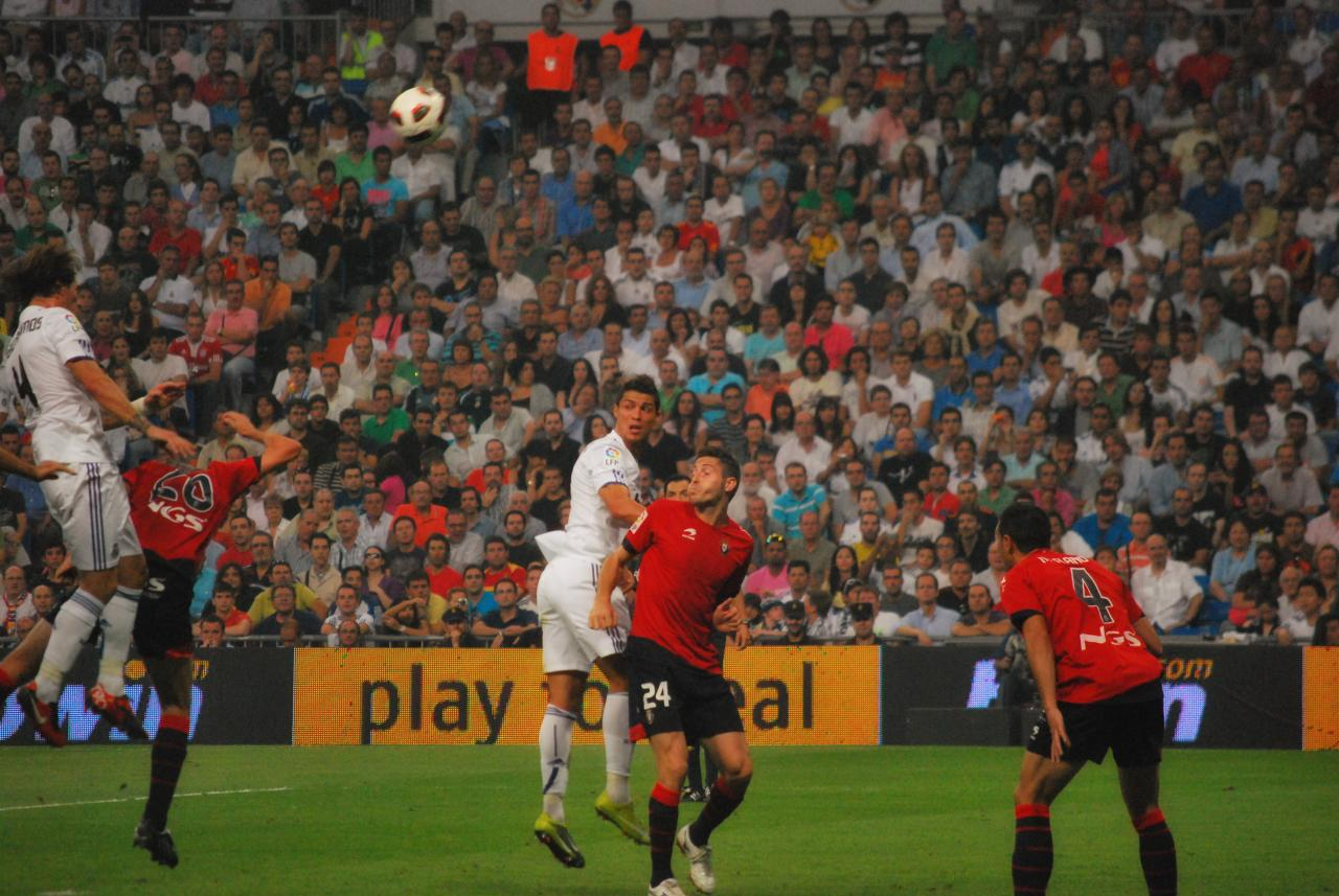 Real Madrid 1 - Osasuna 0 11 de septiembre 2010